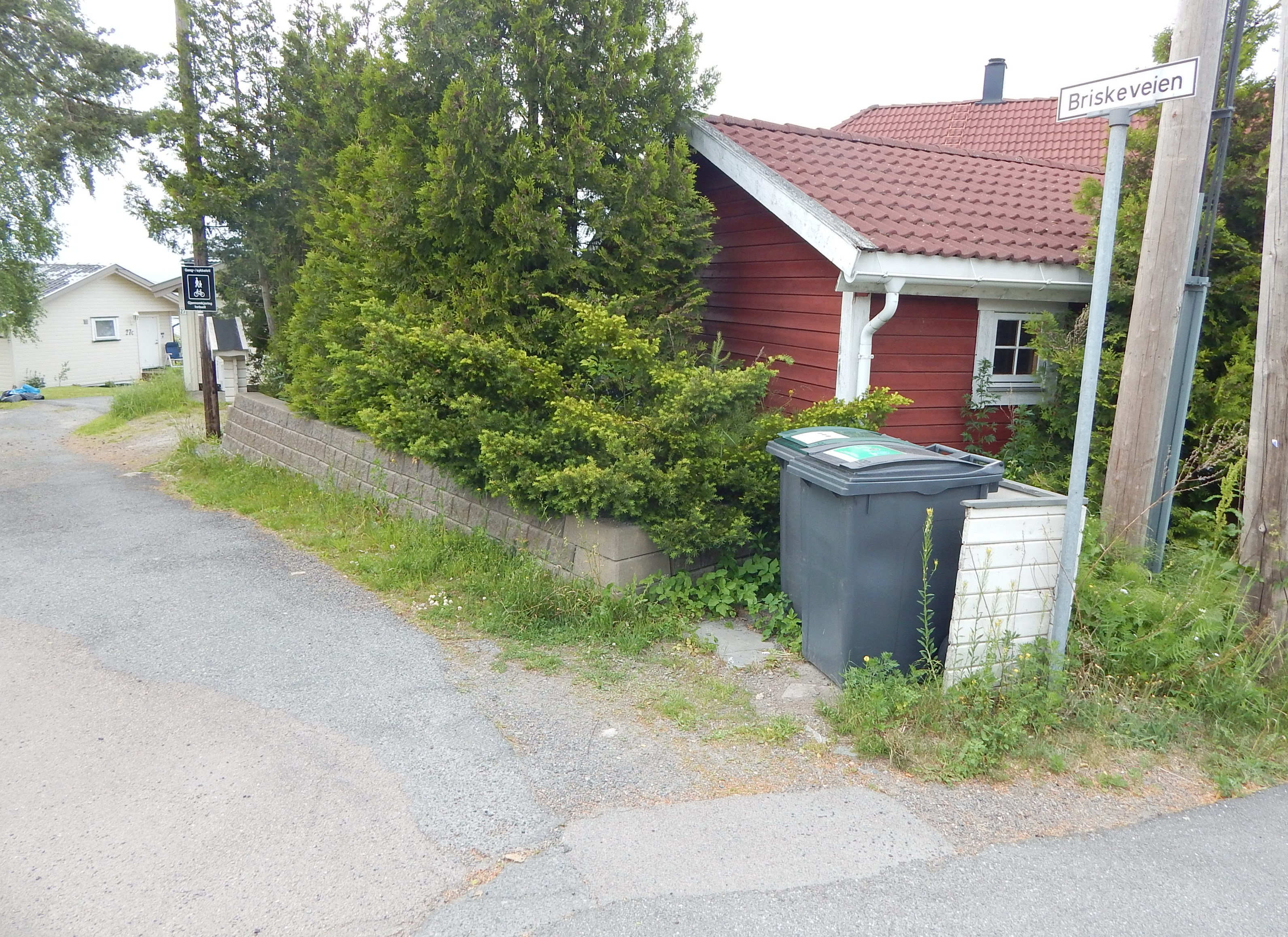 Briskeveien